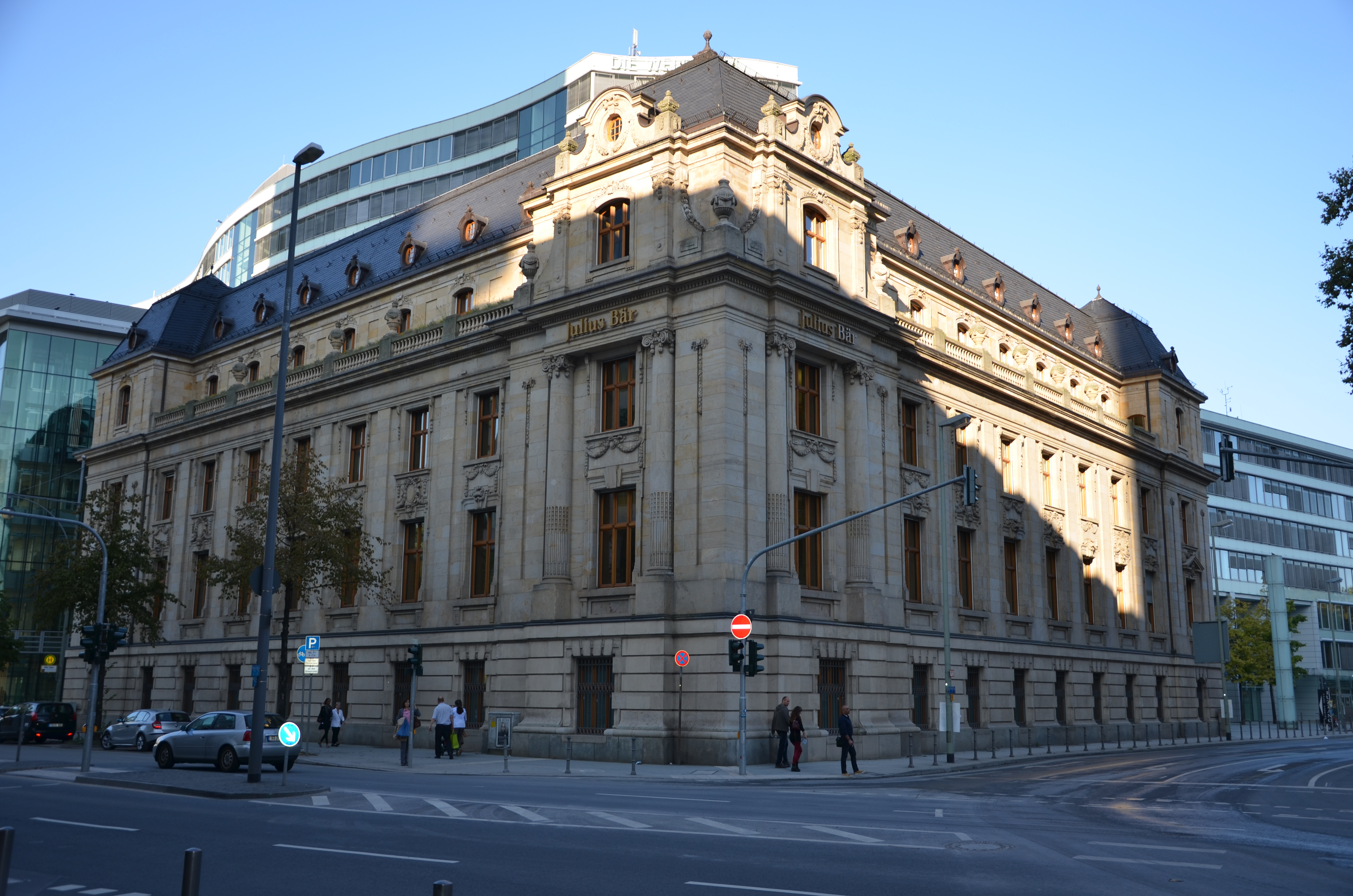 Bankgebäude,Reuterweg 14, Julius Bär Gruppe AG, Frankfurt am Main